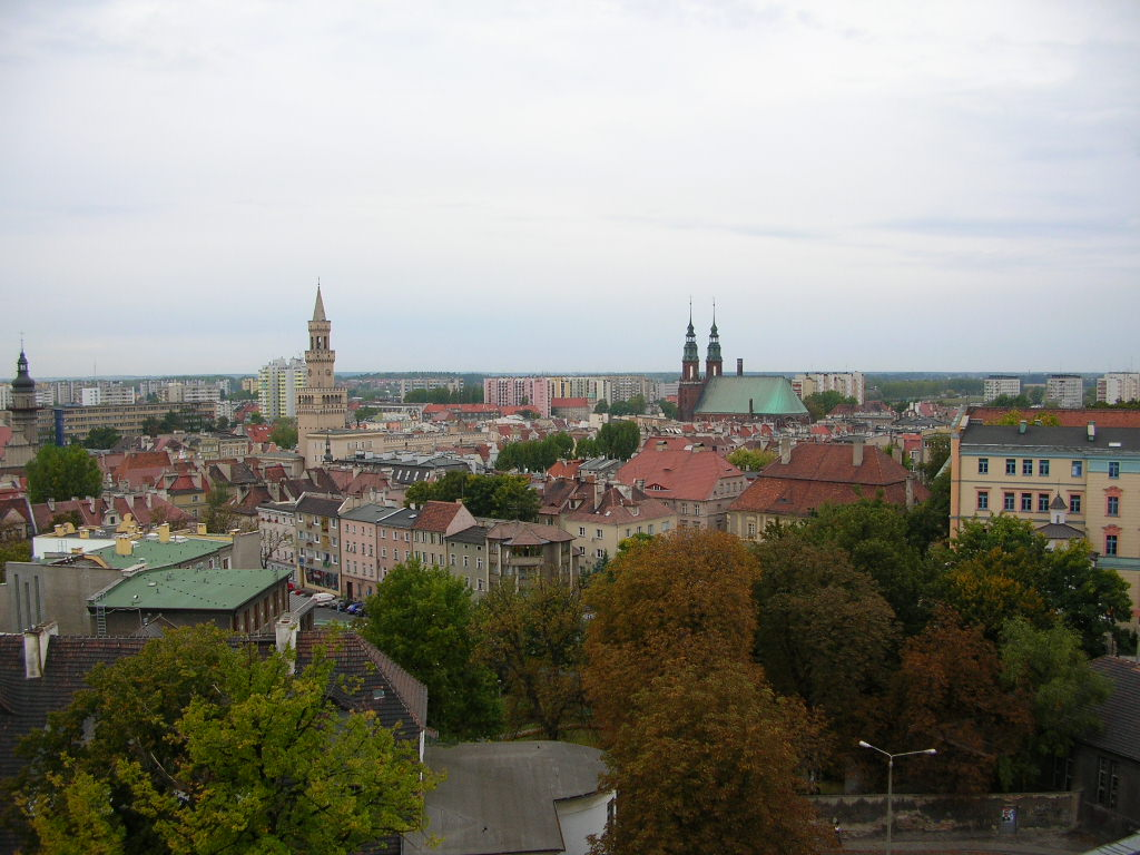 Opole - Widok Ogólny Autor - Bartek Wawraszko ( Bast )